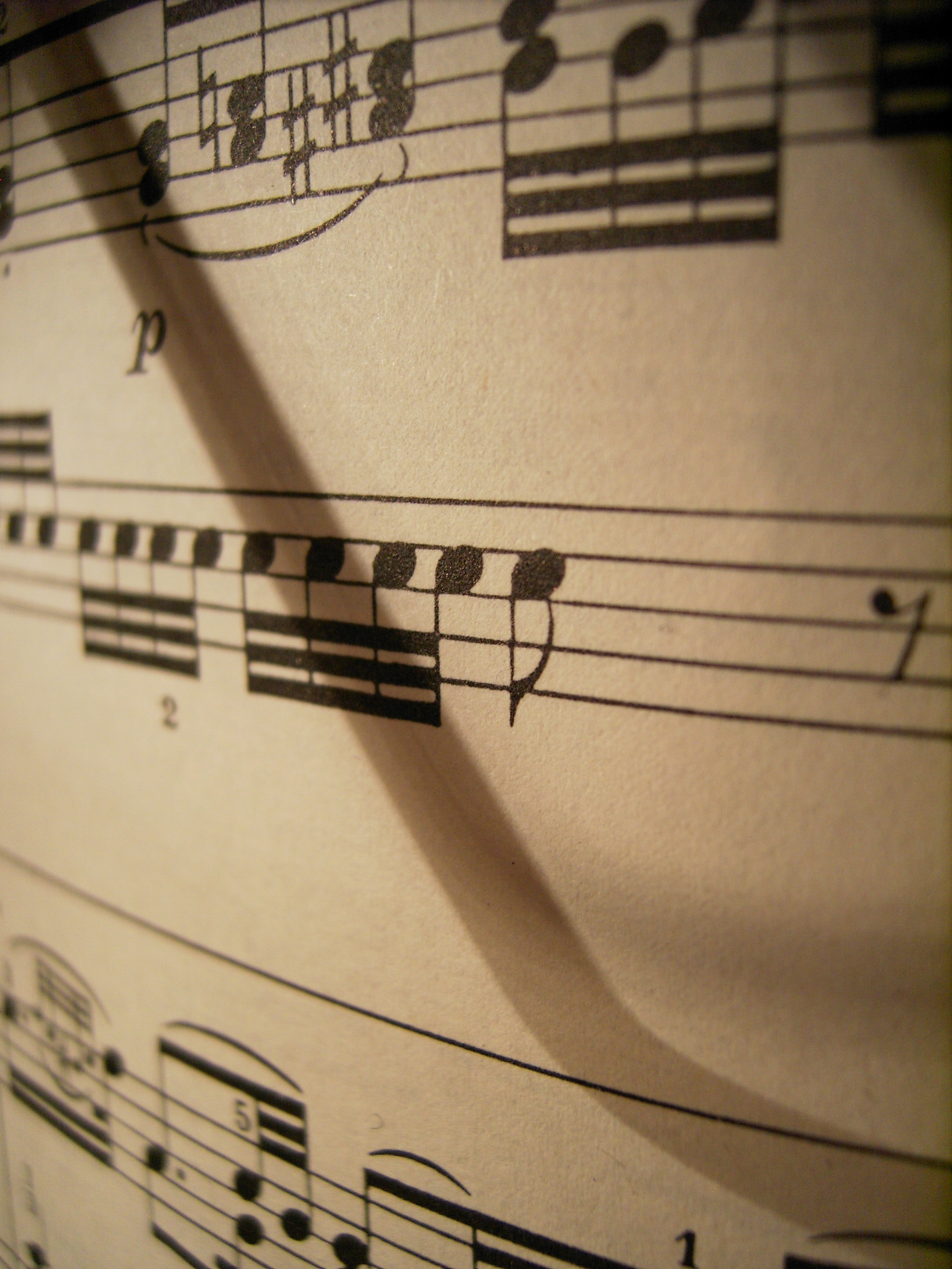 Notenblatt, seitlich beleuchtet